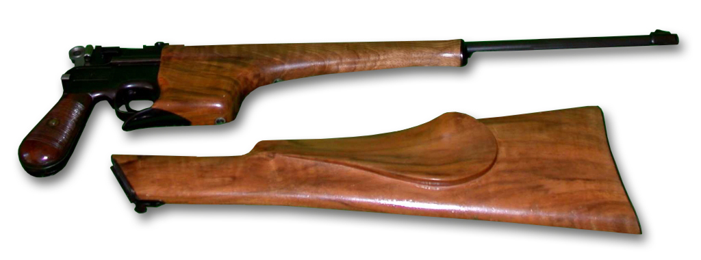 Neue Version des Bildes "Mauser C96 carbine.jpg" mit neutralem/weißen Hintergrund und technischem Schatten